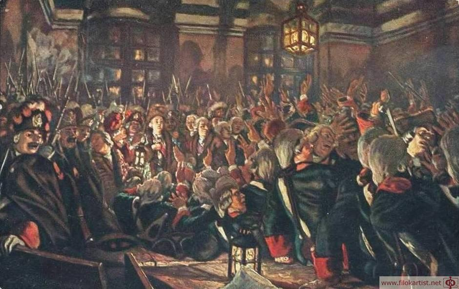 Цесаревна Елизавета у Преображенских казарм 25 ноября 1741г. Лансере Евгений Евгеньевич